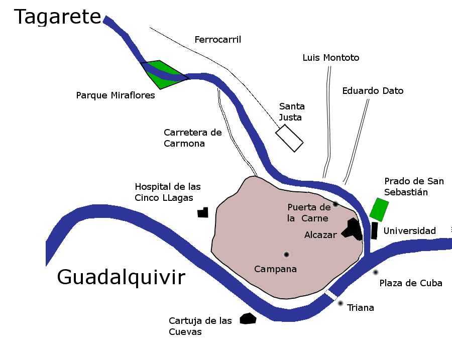 Croquis en el que representa el antiguo cauce del arroyo Tagarate, afluente del rio Guadalquivir, a su paso por la ciudad de Sevilla, Andalucía, España.